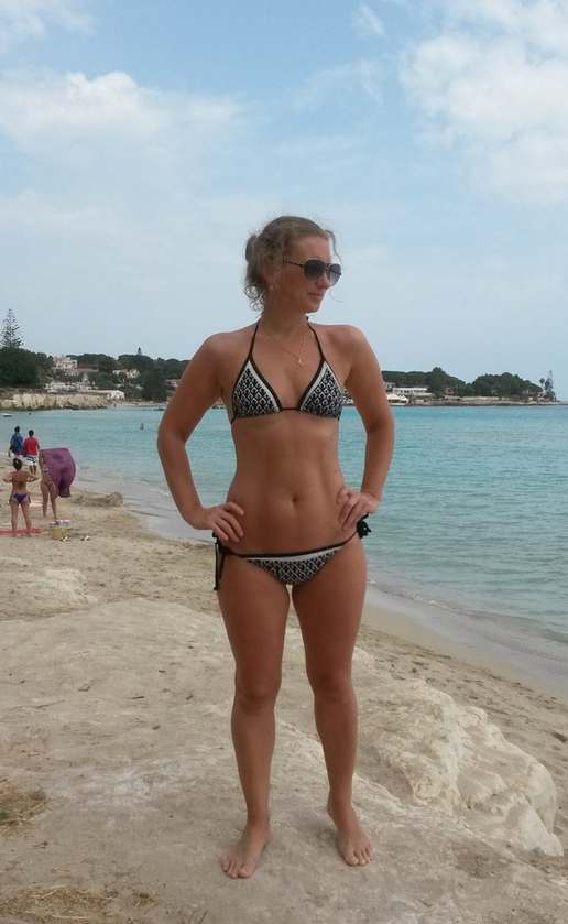 Педагог-логопед Ольга Митрофанова, на Сицилии, в 2016 году. Фото сделано в поддержку акции #учителятожелюди.